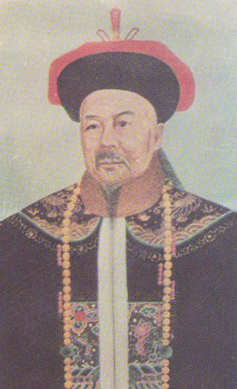 中文（台灣）: 曾習經官服照